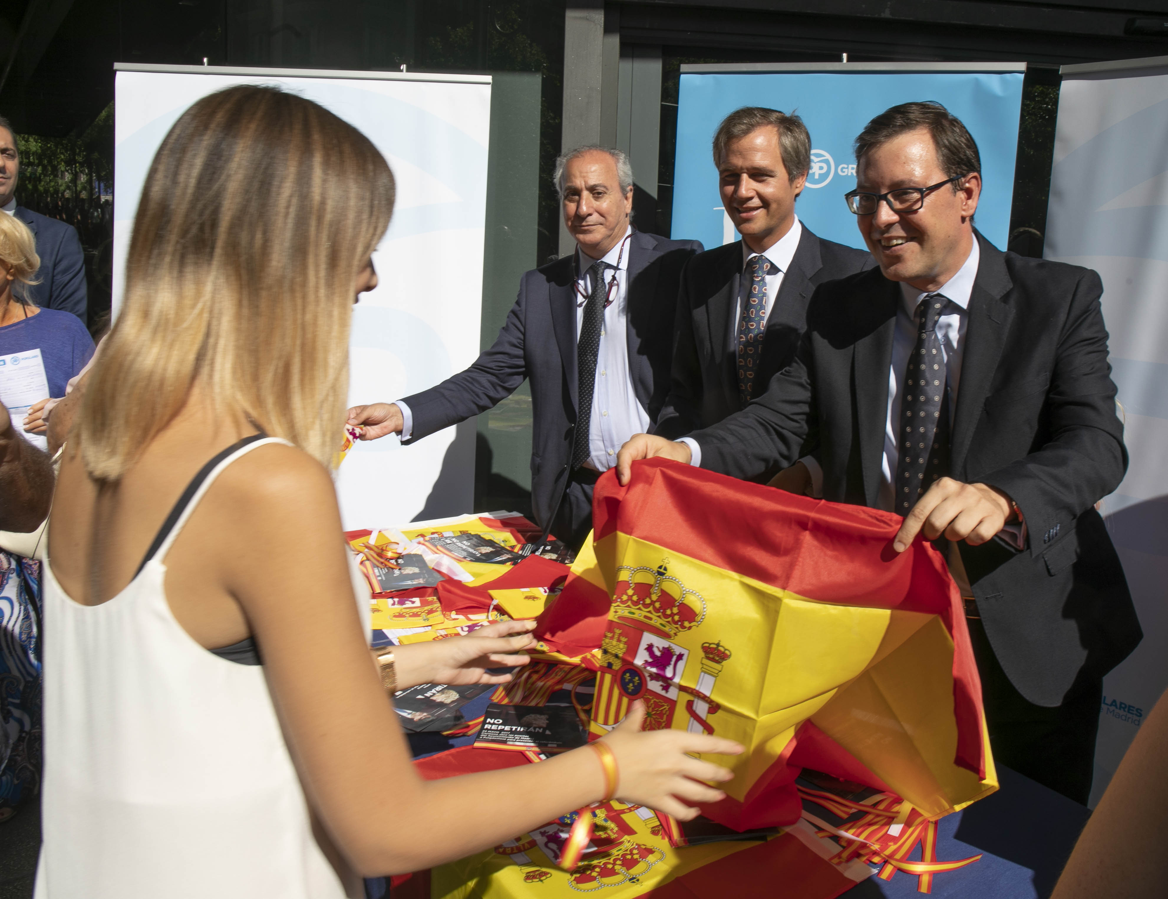 Juan Carlos Vera, Antonio González Terol, Alfonso Serrano, Jose Luis Martinez Almeida, Mar Blanco, Isabel Ayuso y Ana Isabel Perez Baos. Campaña PP Madrid: " Pon una bandera en tu balcón".